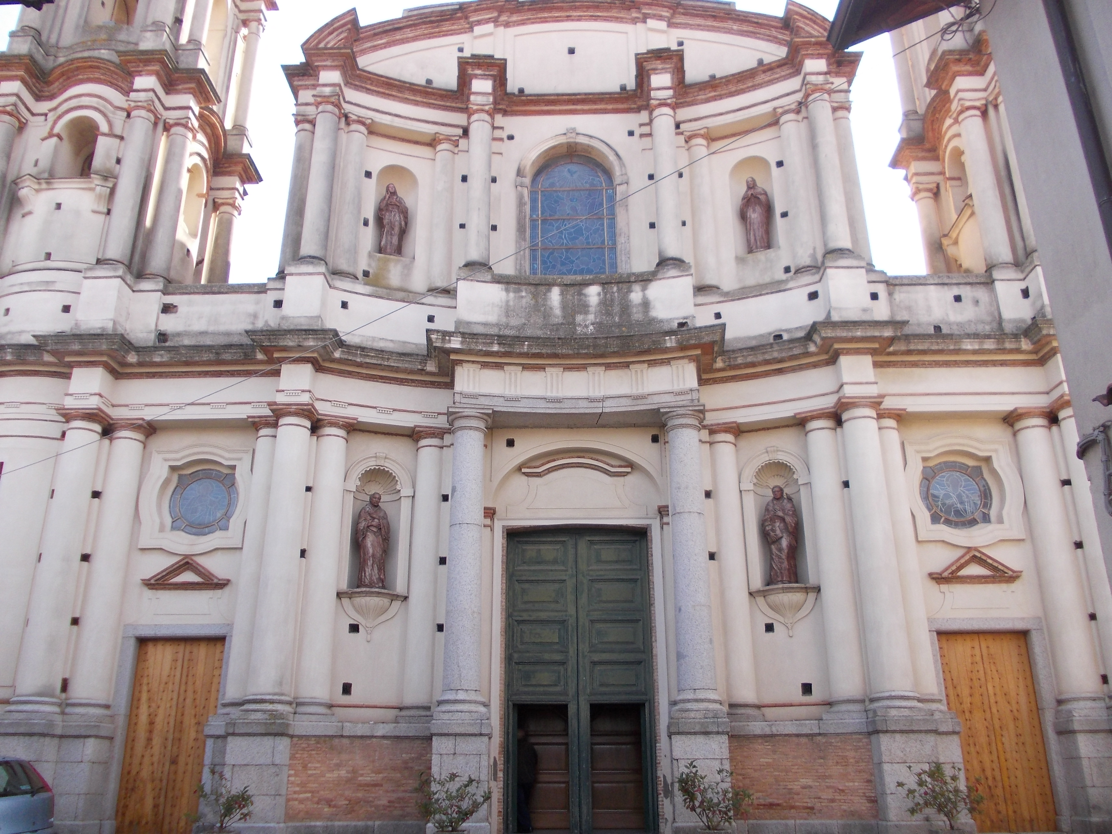 Chiesa di Maria Santissima del Rosario di Polistena.